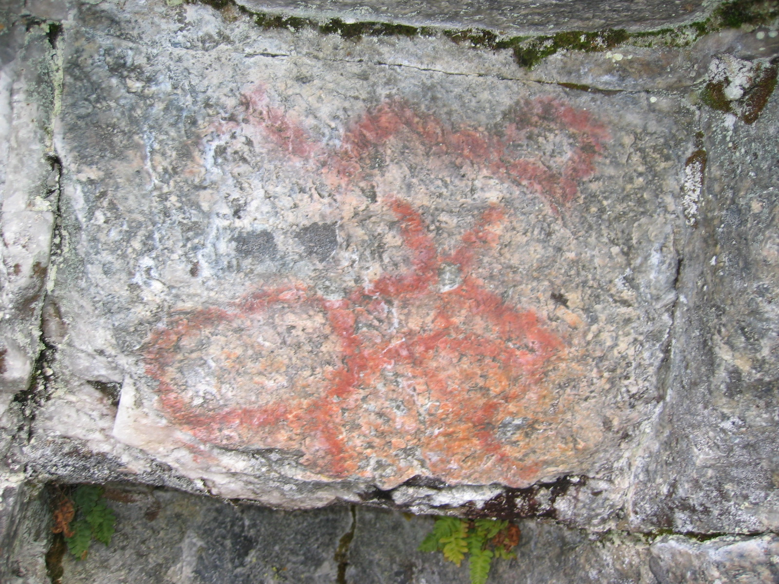 3000 år gamla hällmålningar (RAÄ-nr Bodsjö 176:1) vid Forsaleden i Bodsjö socken, Bräcke kommun, Jämtland, Jämtlands län, Sverige.